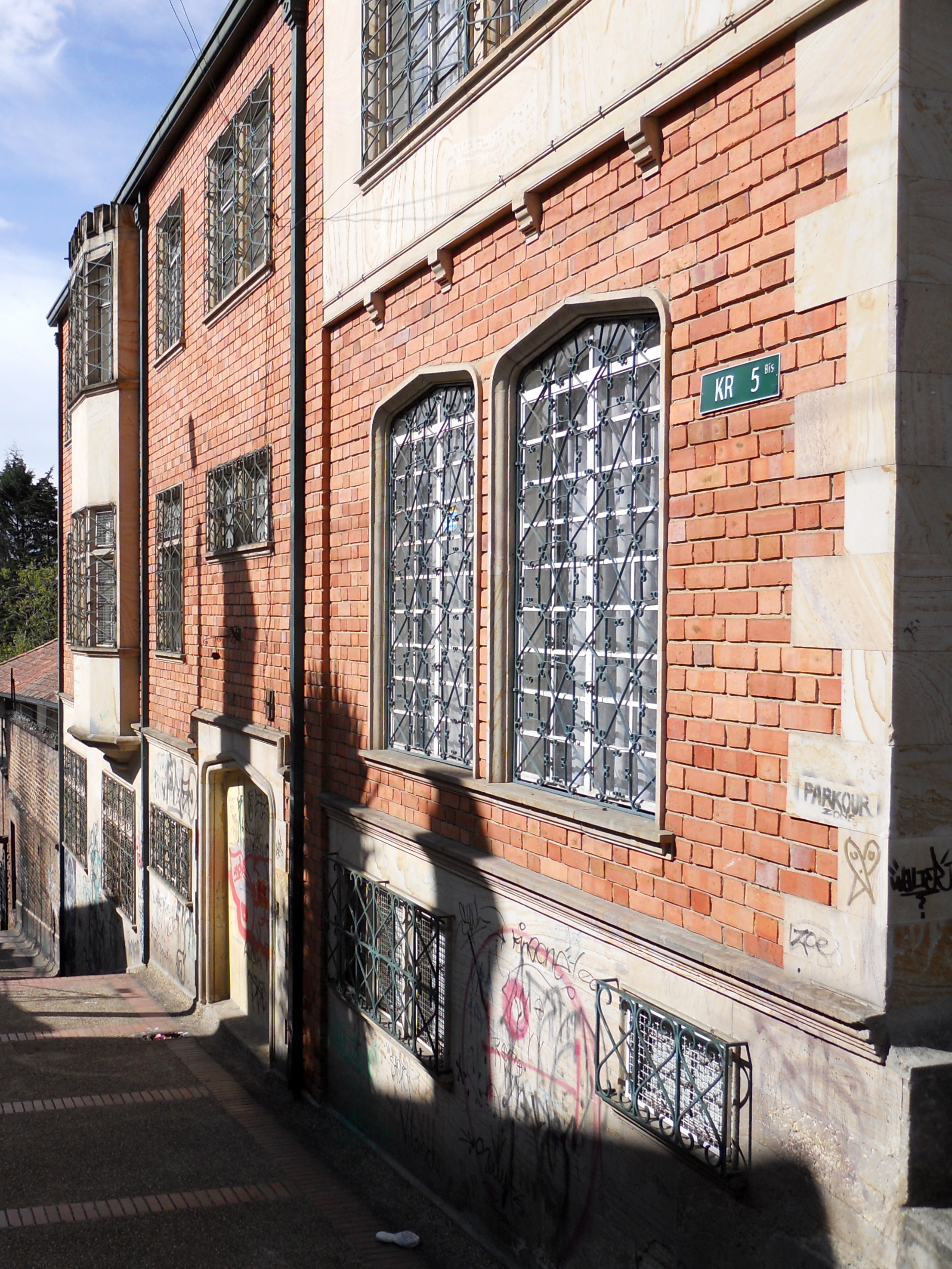 Fachada en el barrio La Merced, tv 5 con dg 34. Bogotá.